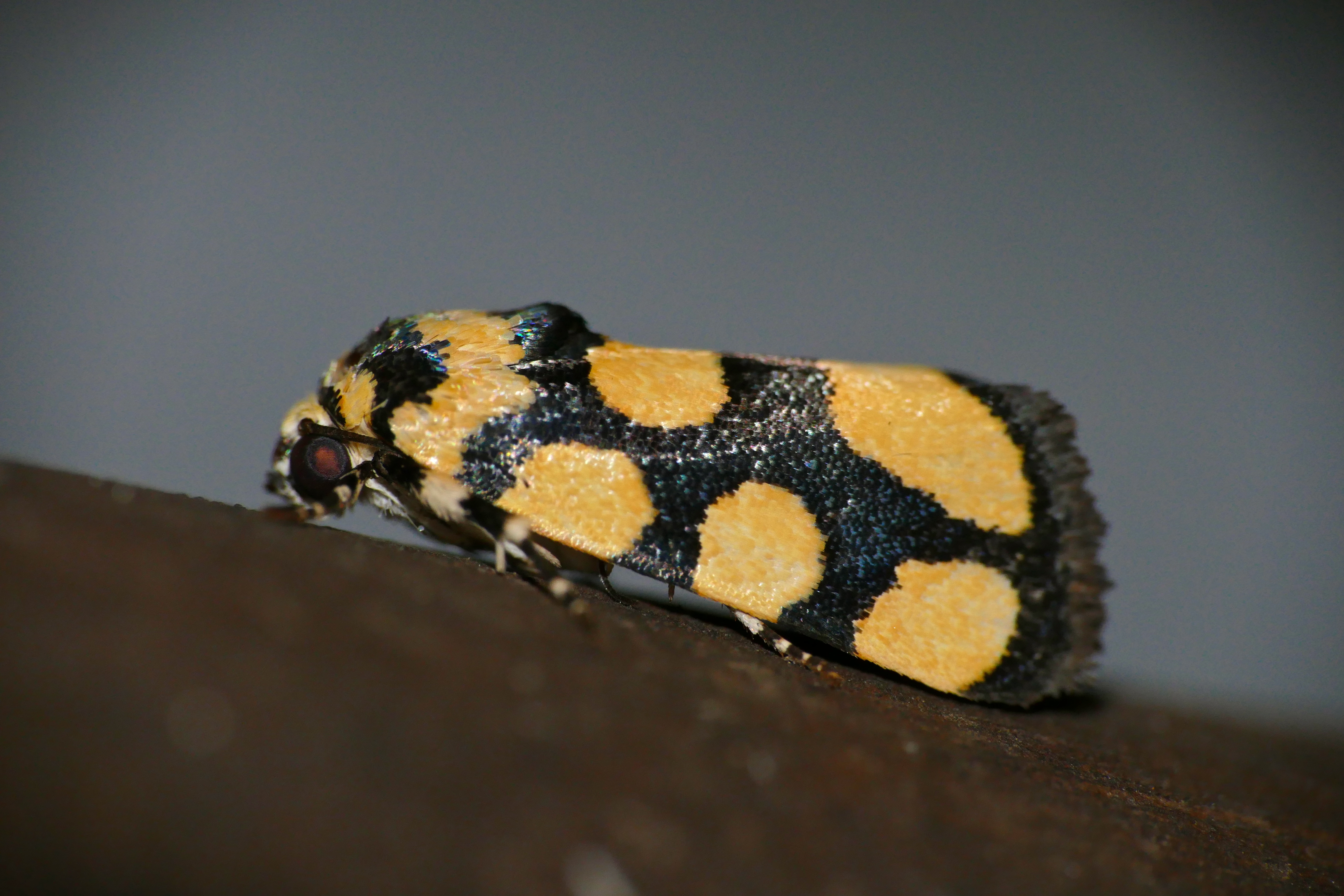 Letaba Camp, Kruger NP, SOUTH AFRICA